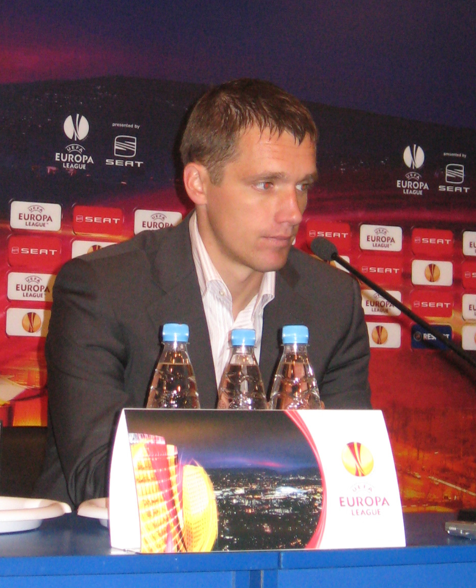 Виктор Гончаренко